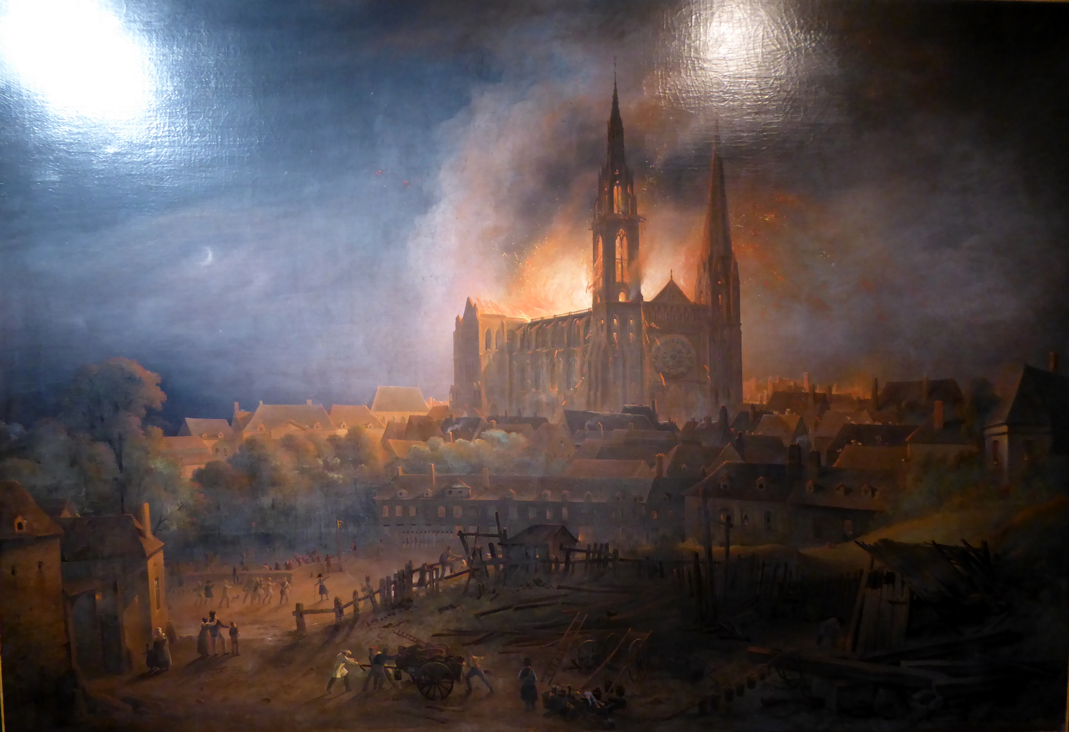 tableau représentant l'incendie de la cathédrale de Chartres du 4 juin 1836 par François-Alexandre Pernot (1837), musée des beaux-arts de Chartres (inv. 3552), Eure-et-Loir, France.